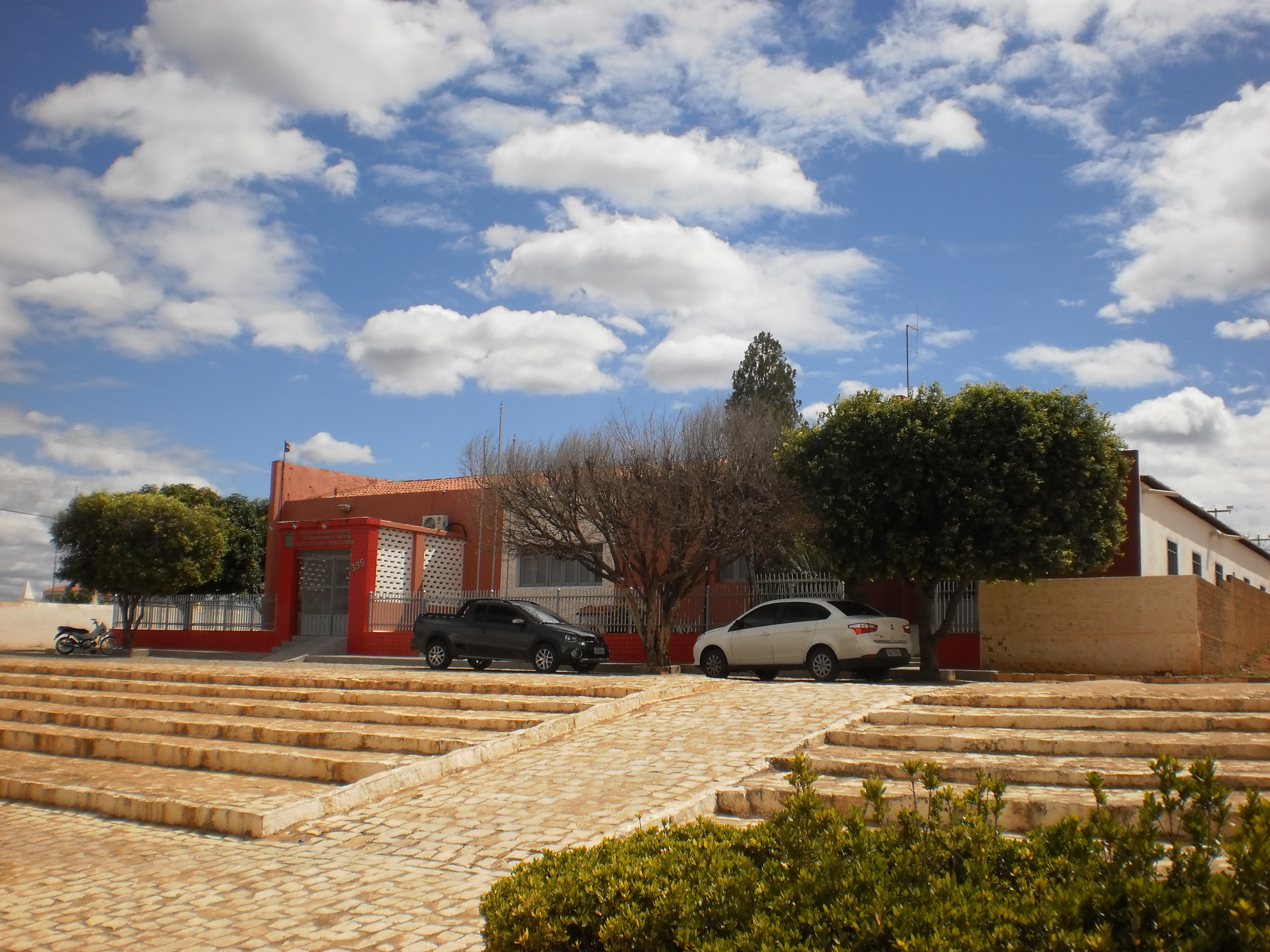 Palácio José Florentino de Oliveira, sede da Câmara Municipal de Umarizal - Rio Grande do Norte, Brasil.